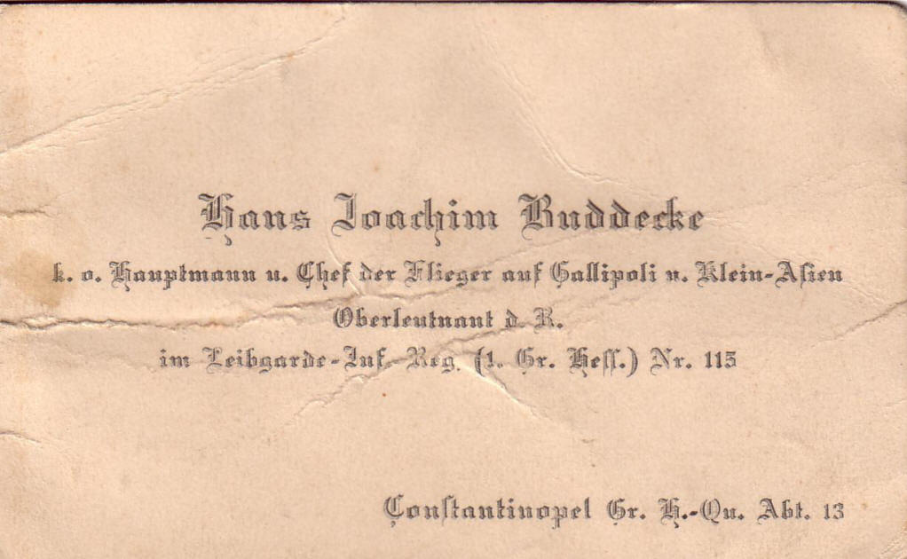 Visitenkarte von Hans-Joachim Buddecke als Chef der Flieger in Galipoli